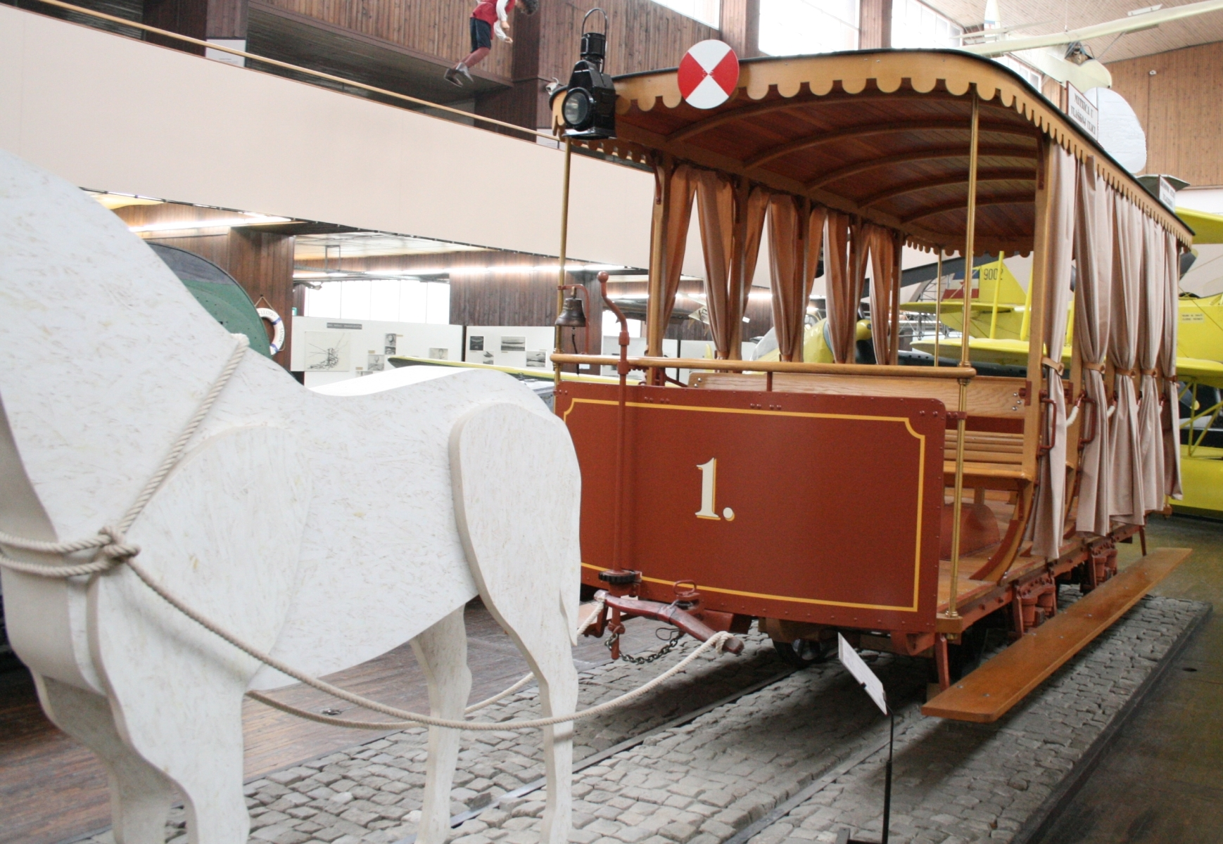 Zagrebački konjski tramvaj, postav Tehničkog muzeja u Zagrebu Horse tram in museum in Zagreb, Croatia